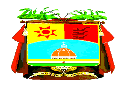 Escudo del municipio Arzobispo Chacón, estado Mérida, Venezuela